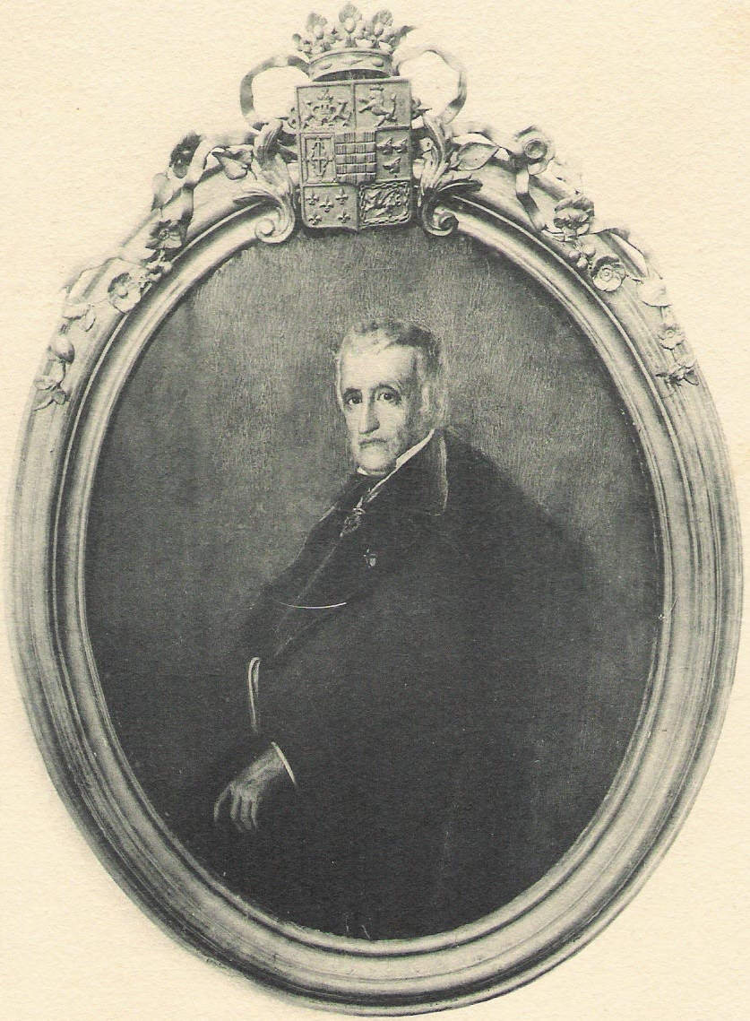 Retrato de Juan Crisóstomo de Goyeneche y Aguerrevere